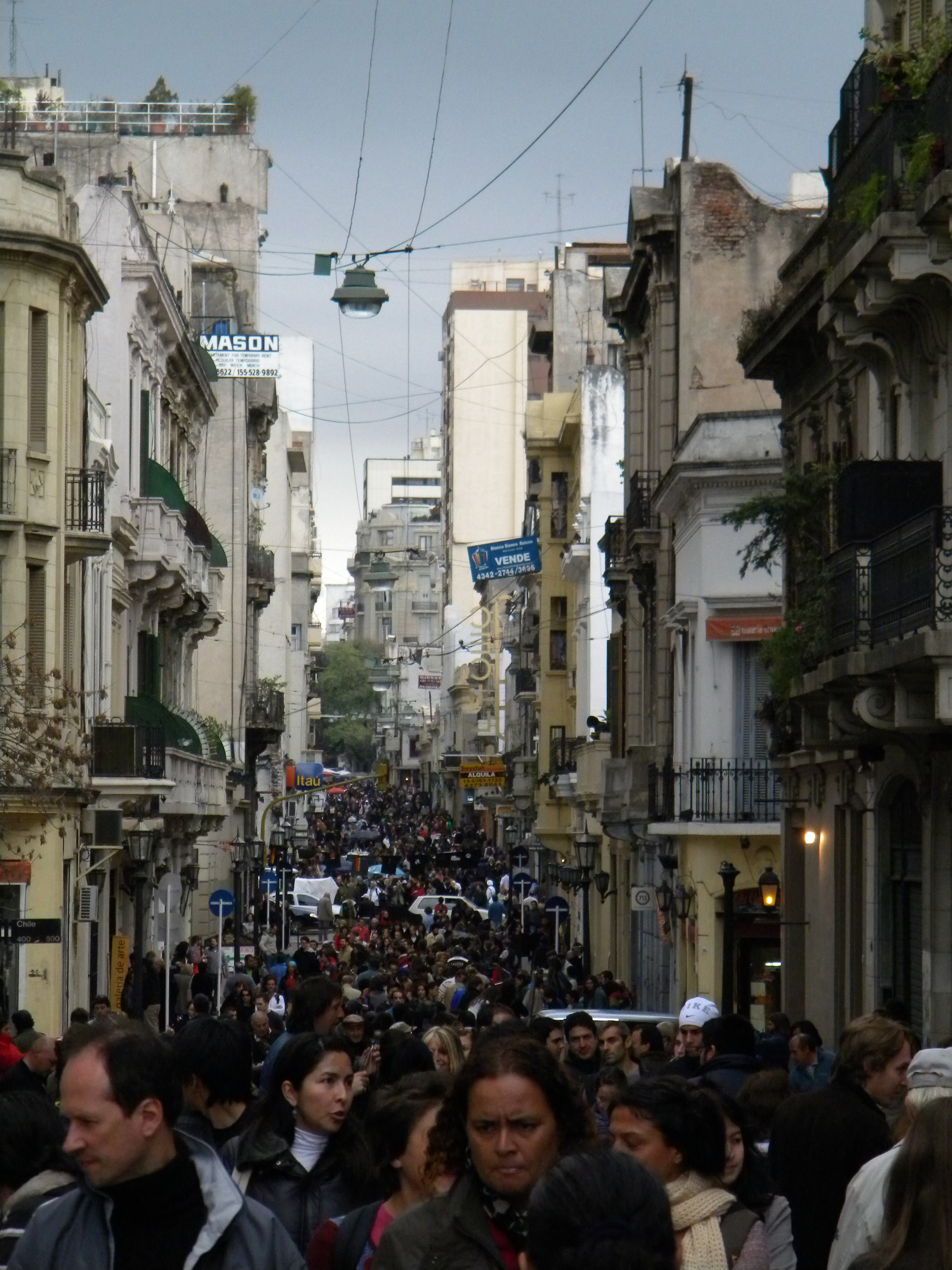 Gente caminando por San Telmo un día domingo donde la misma se hace peatonal. Frecuentada por numerosos turistas.